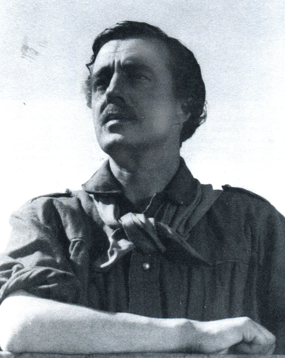 Nino Bixio interpretato da de Sica in "Un garibaldino al convento", film da lui diretto nel 1942